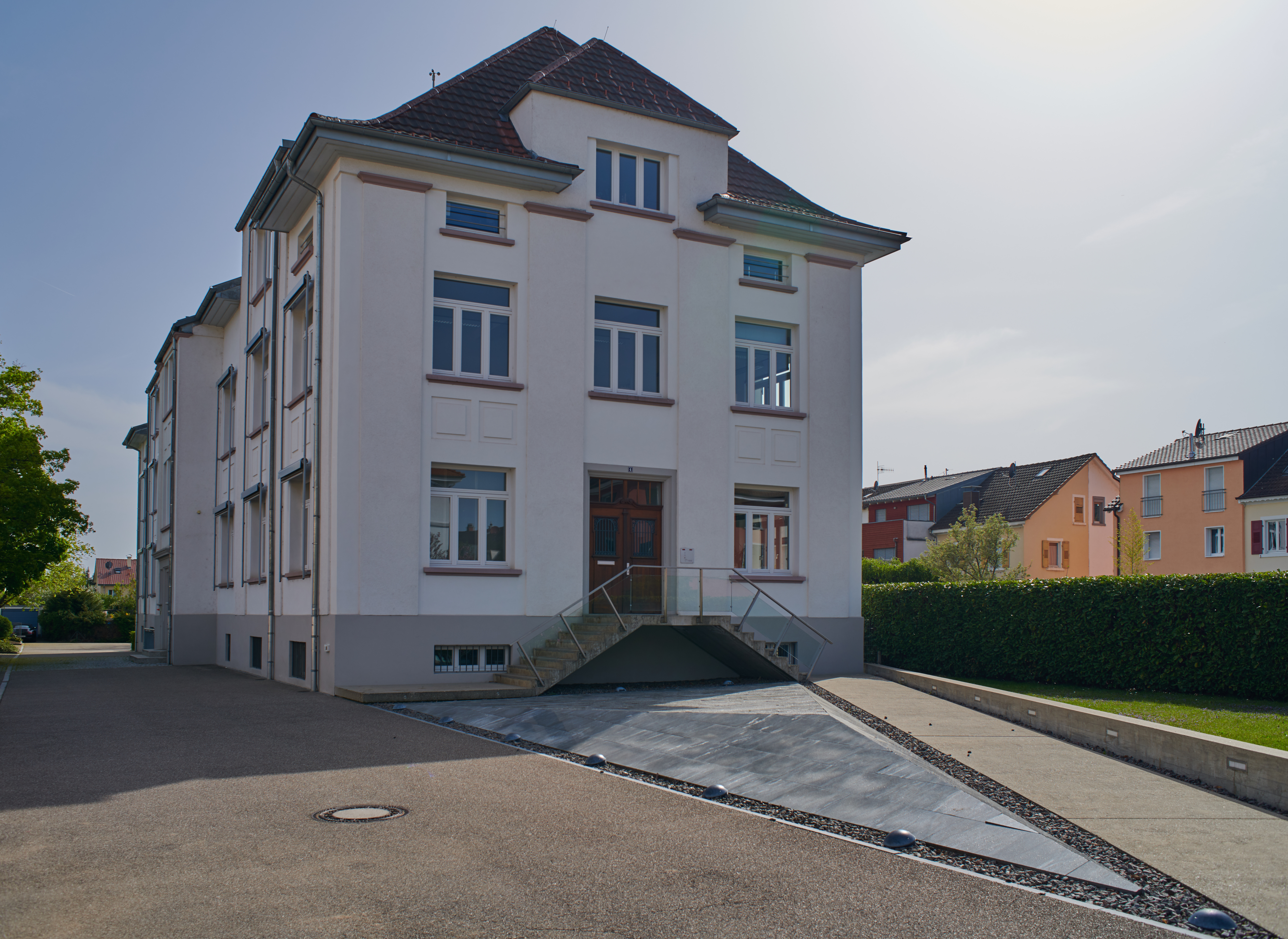 Lörrach: Wohnbau Lörrach, hier: Hauptsitz in der Schillerstraße 4